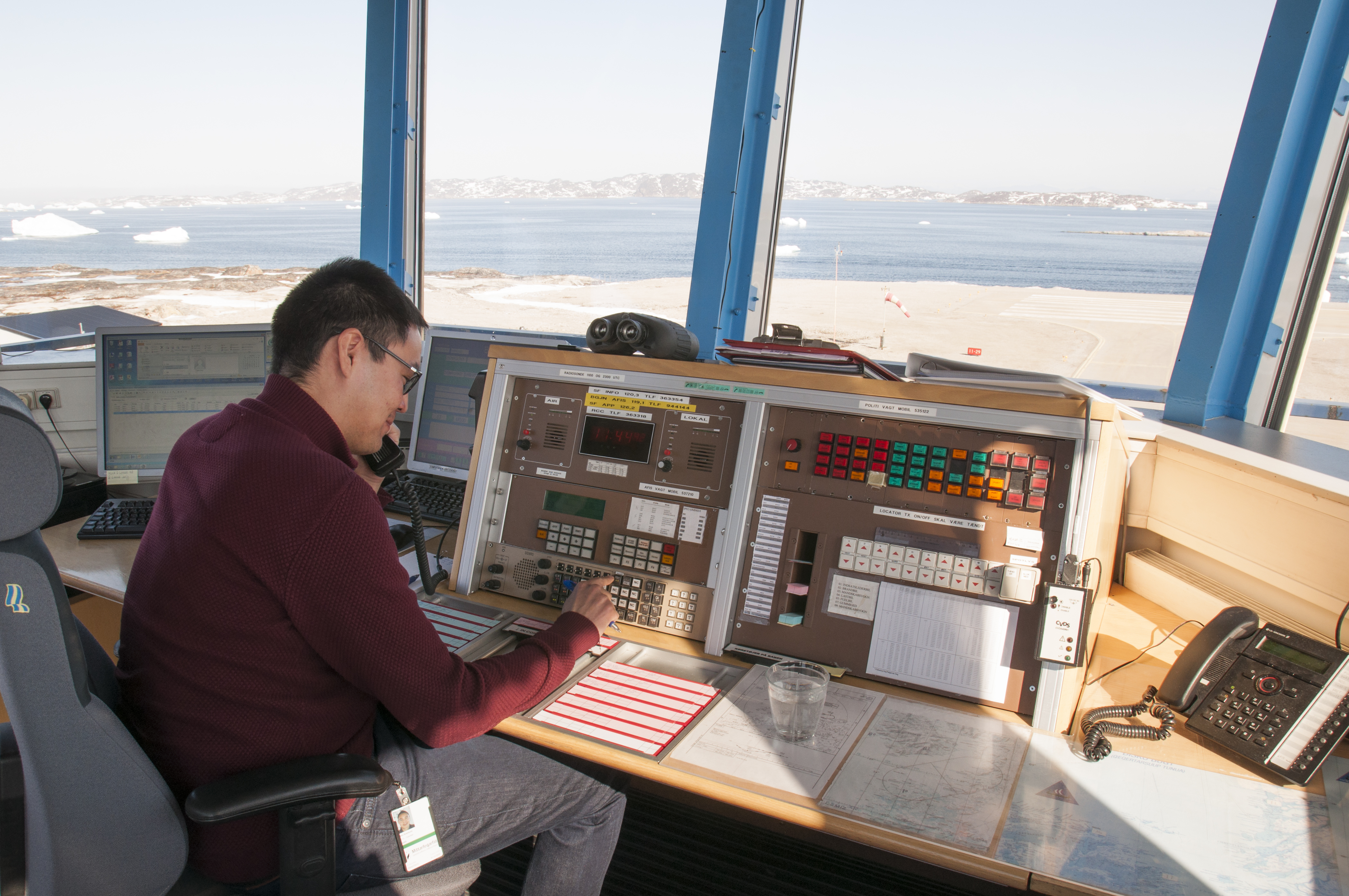 Aasiaat Airport